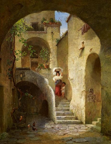 Im Innenhof eines italienischen Gehoefts